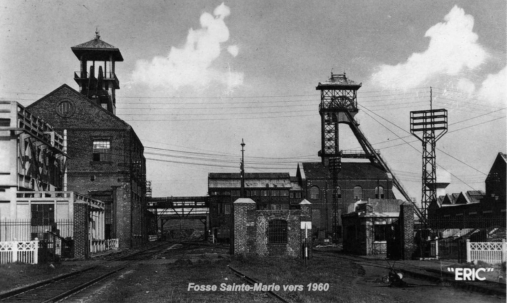 Fosse Sainte marie d'Auberchicourt aujourd'hui disparue